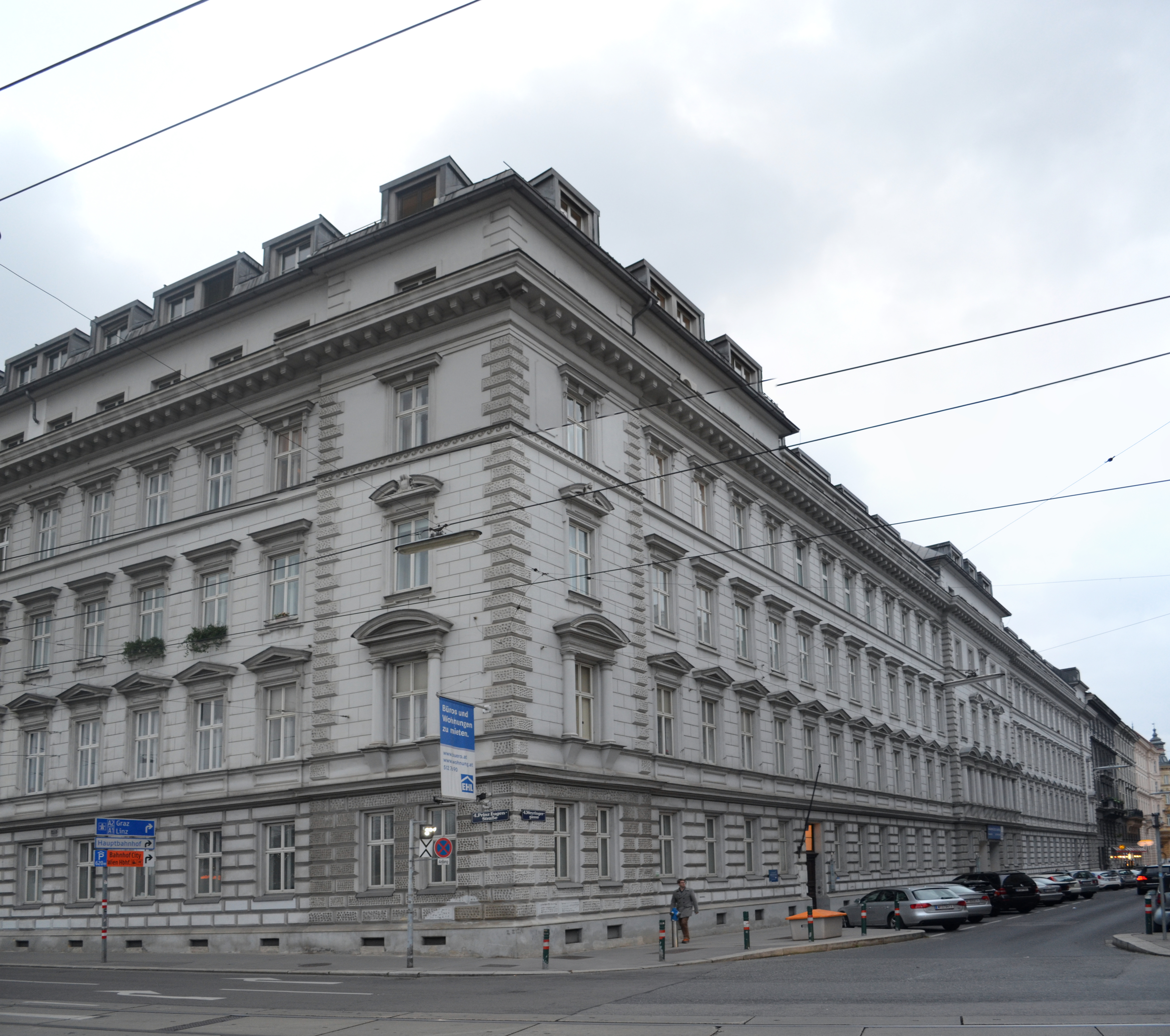 Wien, Weyringergasse 1-5